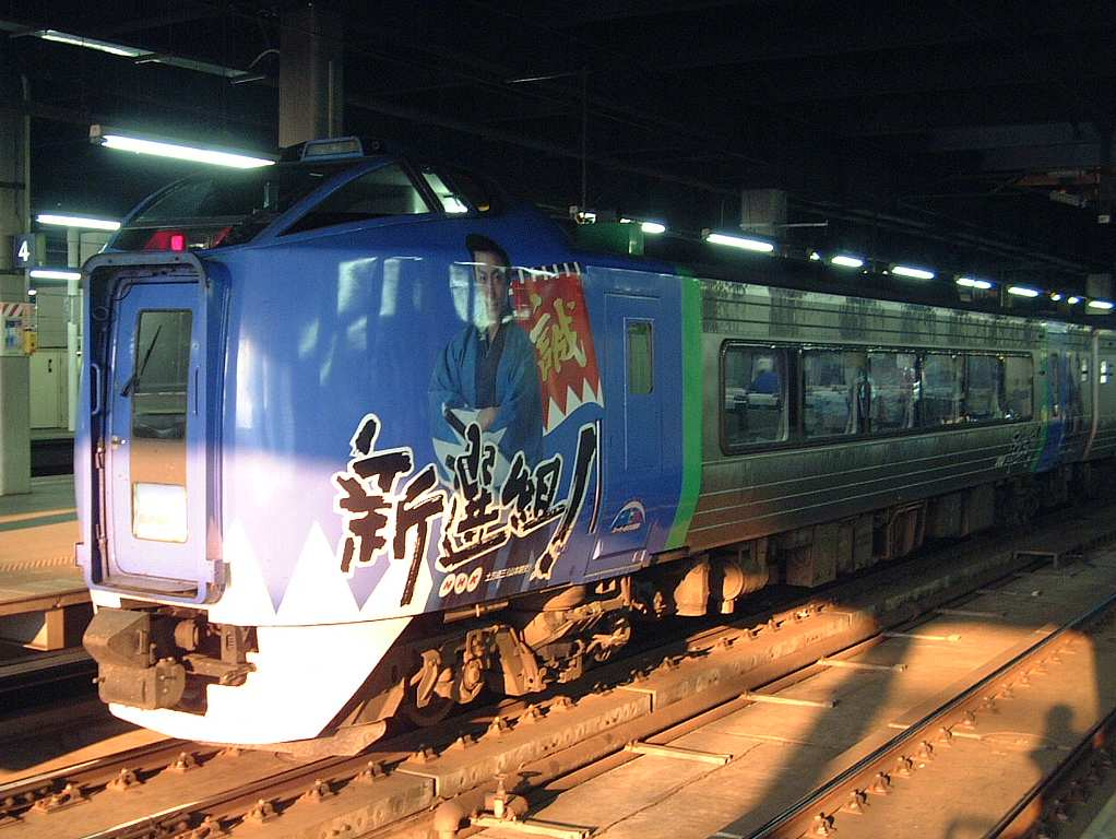 JR北海道キハ281系気動車（キハ281-6 新撰組ラッピング車） JR北海道札幌駅で